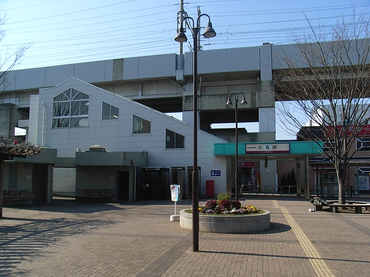 Kuki Station (East Entrance) on JR Tohoku Line. (2-1-1,Chuo,Kuki-shi,Saitama-ken,JAPAN)